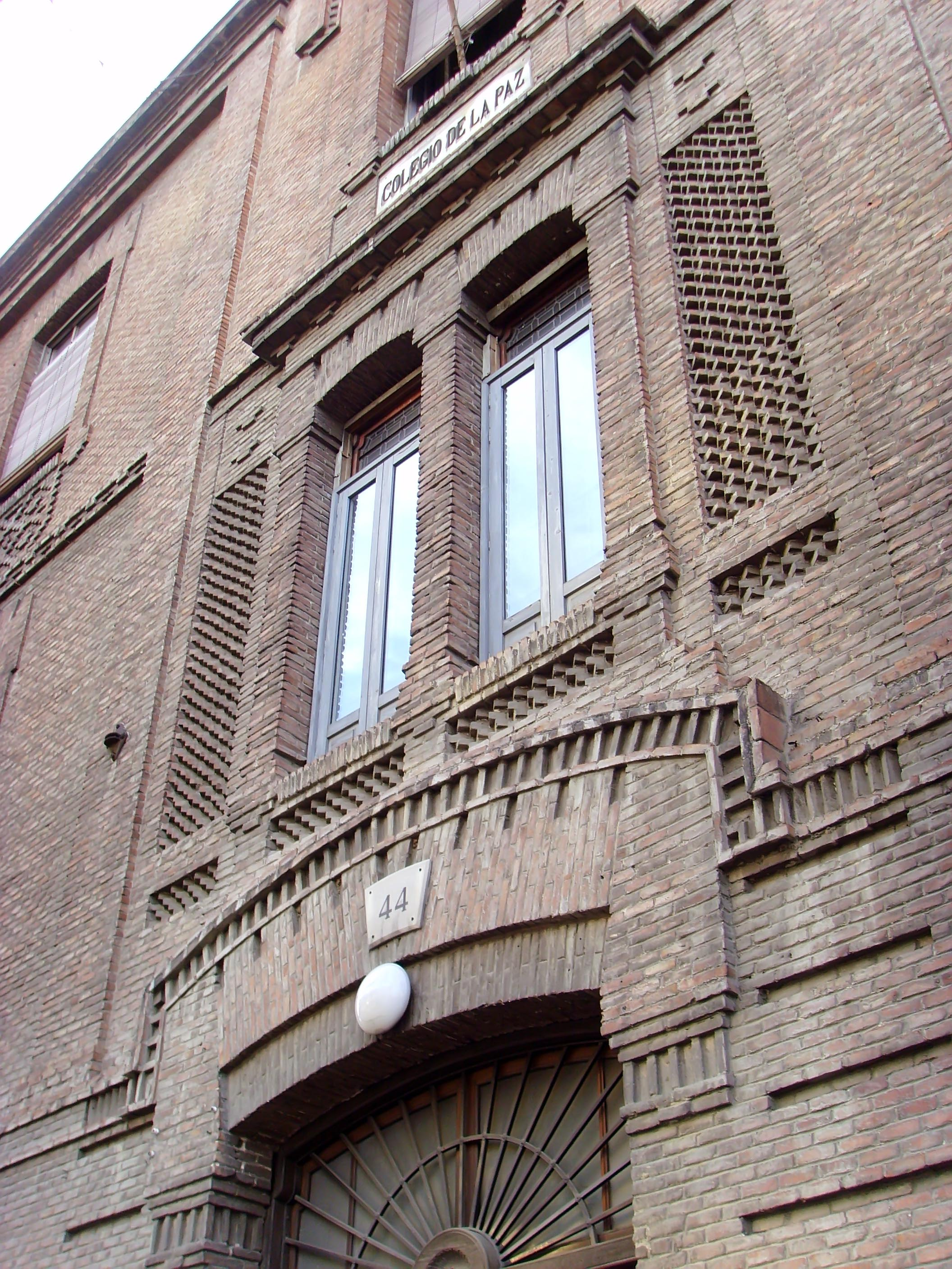 Neo-Mudejar building in Madrid. Neomudéjar madrileño. Residencia para Personas Mayores La Paz. Antiguos Asilo de San José y Colegio de La Paz. Dirección: Calle Doctor Esquerdo, 44. Arquitectos: Luis María Argenty Herrera (colegio) y Joaquín Kramer y Arnaiz (iglesia). Proyecto: 1903. Inaugurado hacia 1906.